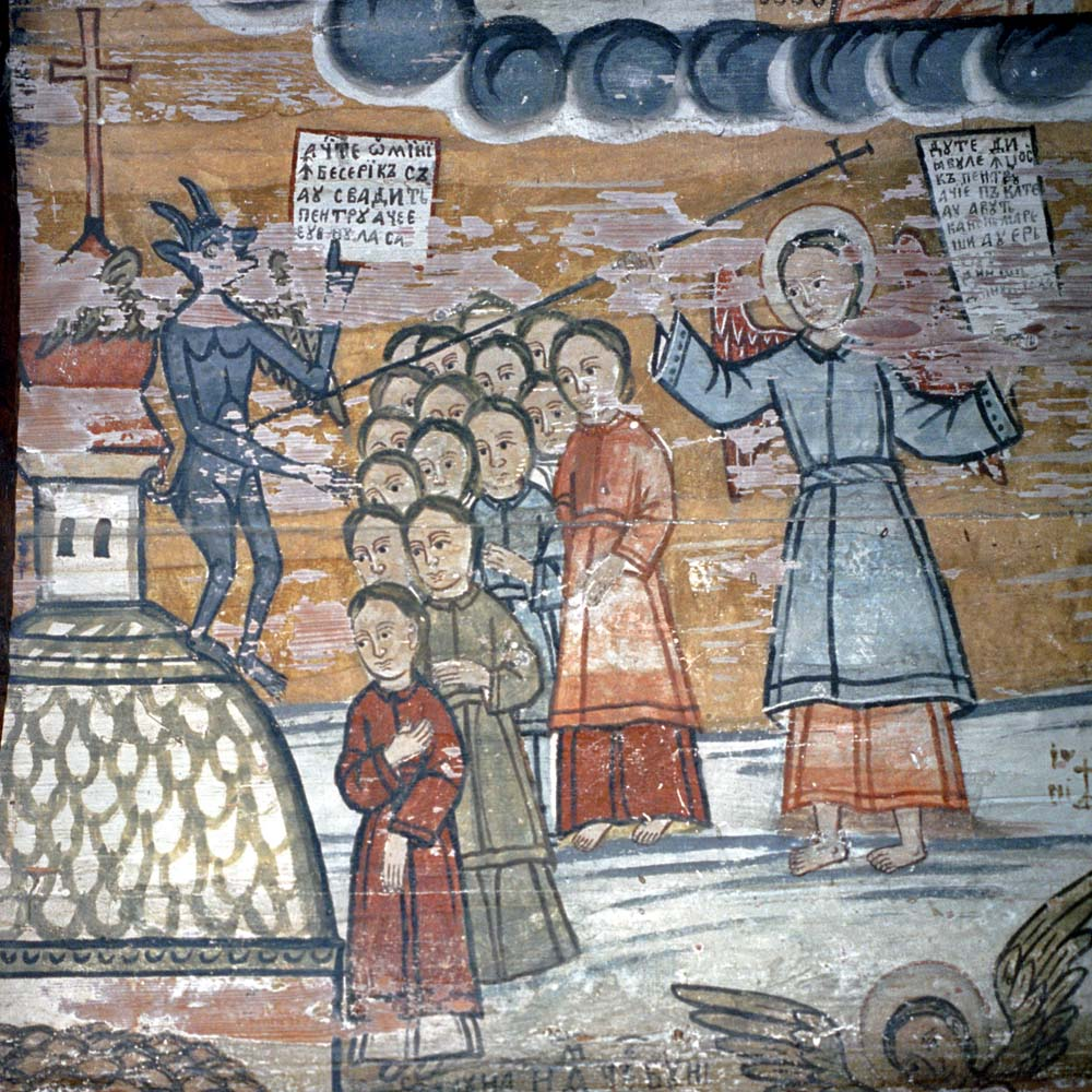 Vama sufletelor "ce în beserică se au sfădit". Peretele de est în tinda femeilor. Foto: Alexandru Baboş, iulie 1997.